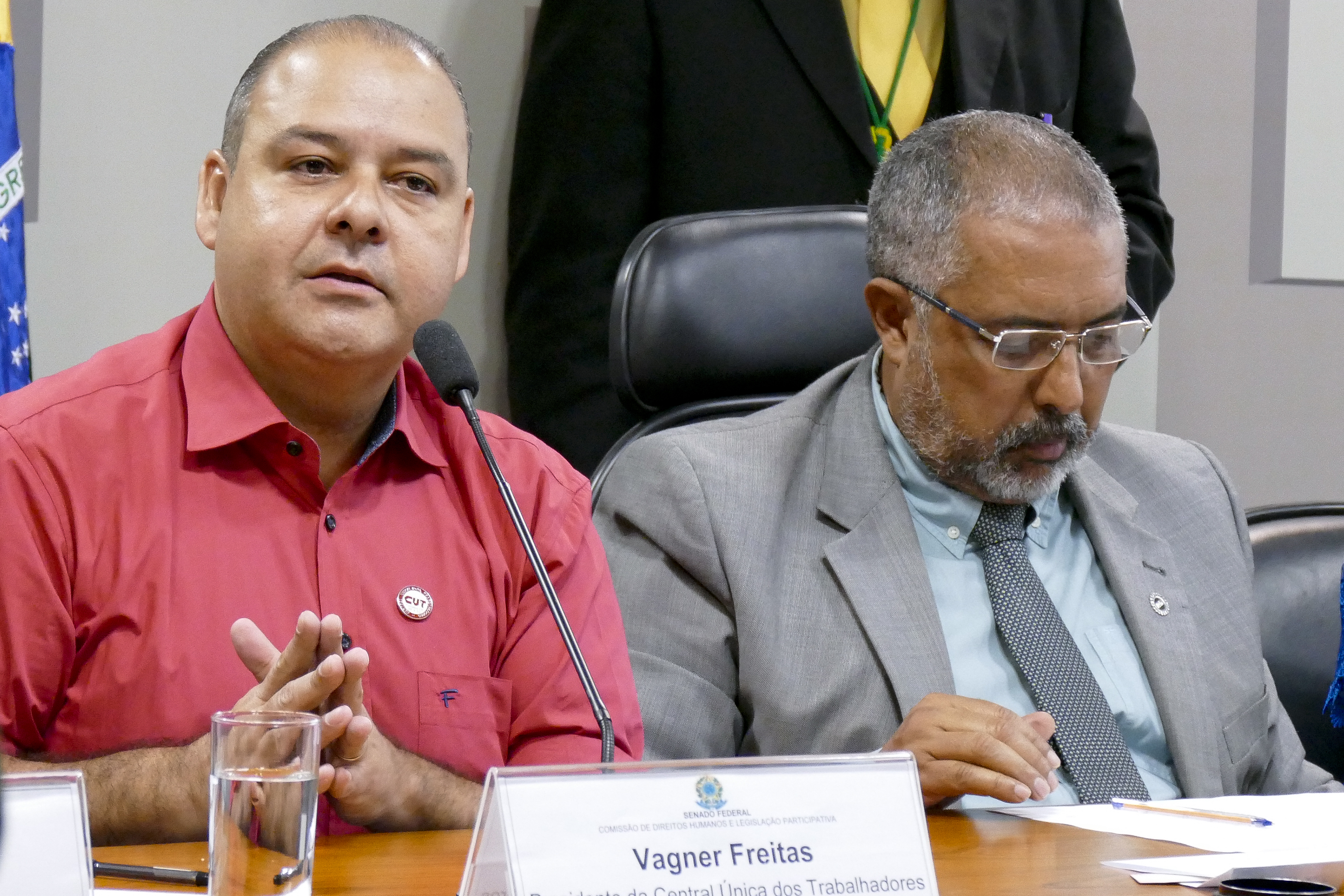 Comissão de Direitos Humanos e Legislação Participativa (CDH) realiza audiência pública interativa para debater sobre: "O mundo do trabalho: desemprego, aposentadoria e discriminação". Lançamento da Frente Parlamentar Mista em Defesa da Classe Trabalhadora. Em pronunciamento, presidente da Central Única dos Trabalhadores (CUT), Vagner Freitas. E/D: presidente da Central Unica dos Trabalhadores (CUT), Vagner Freitas; presidente da CDH, senador Paulo Paim (PT-RS). Foto: Roque de Sá/Agência Senado